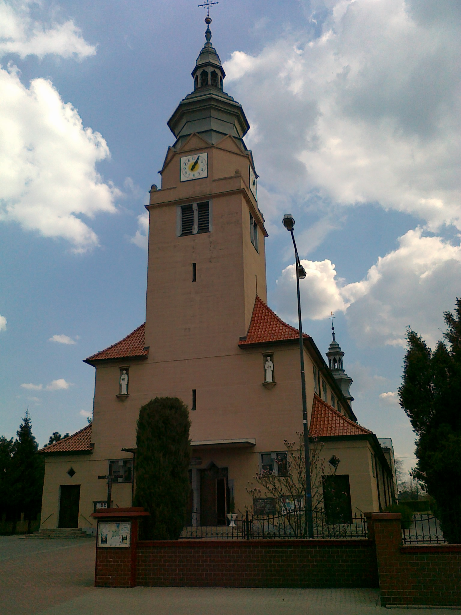 Kościół Matki Bożej Bolesnej w Kędzierzynie-Koźlu